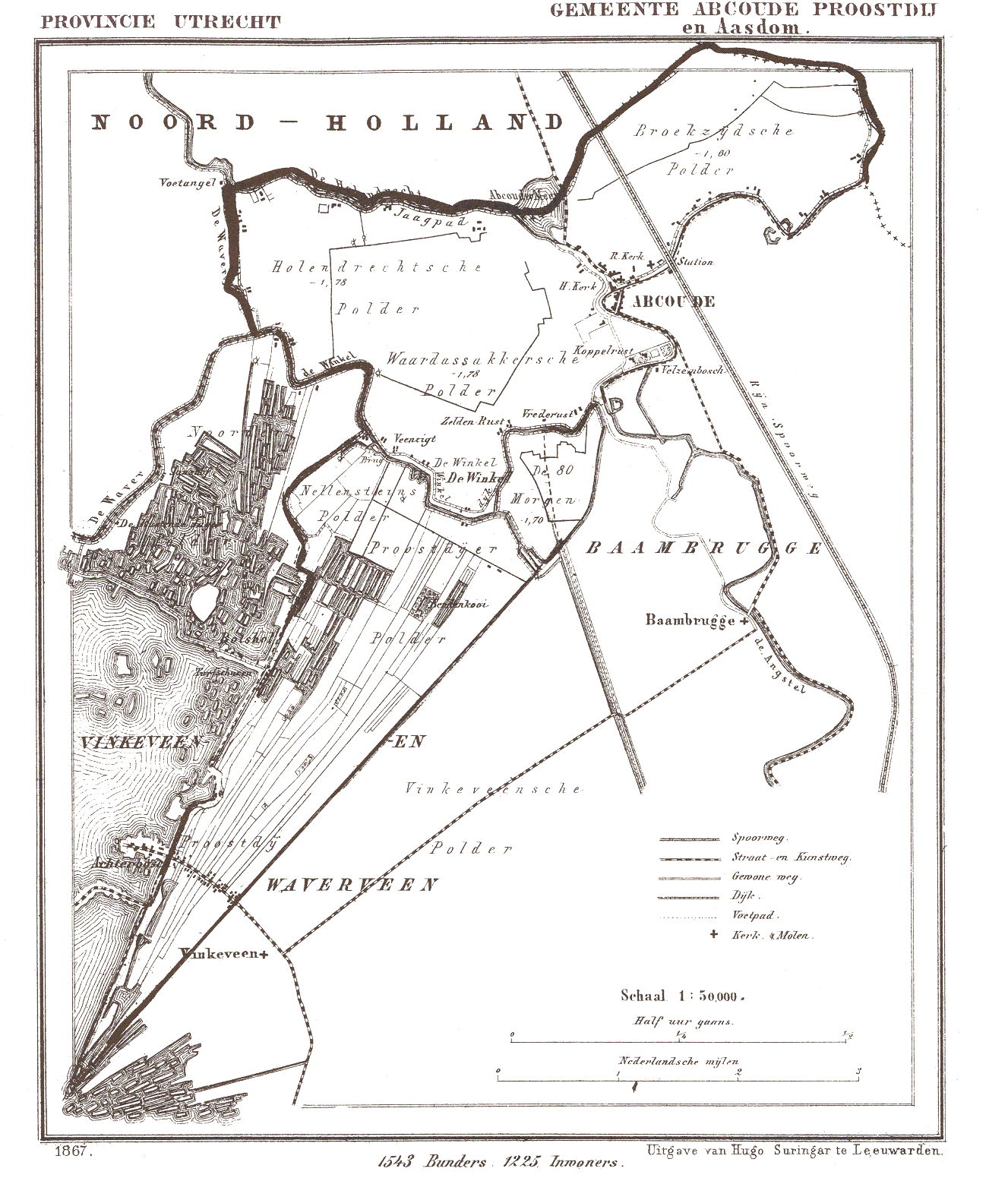 Kaart van Abcoude uit Gemeente Atlas van Nederland, J. Kuyper 1865-1870, Uitgave Hugo Suringar Leeuwarden.